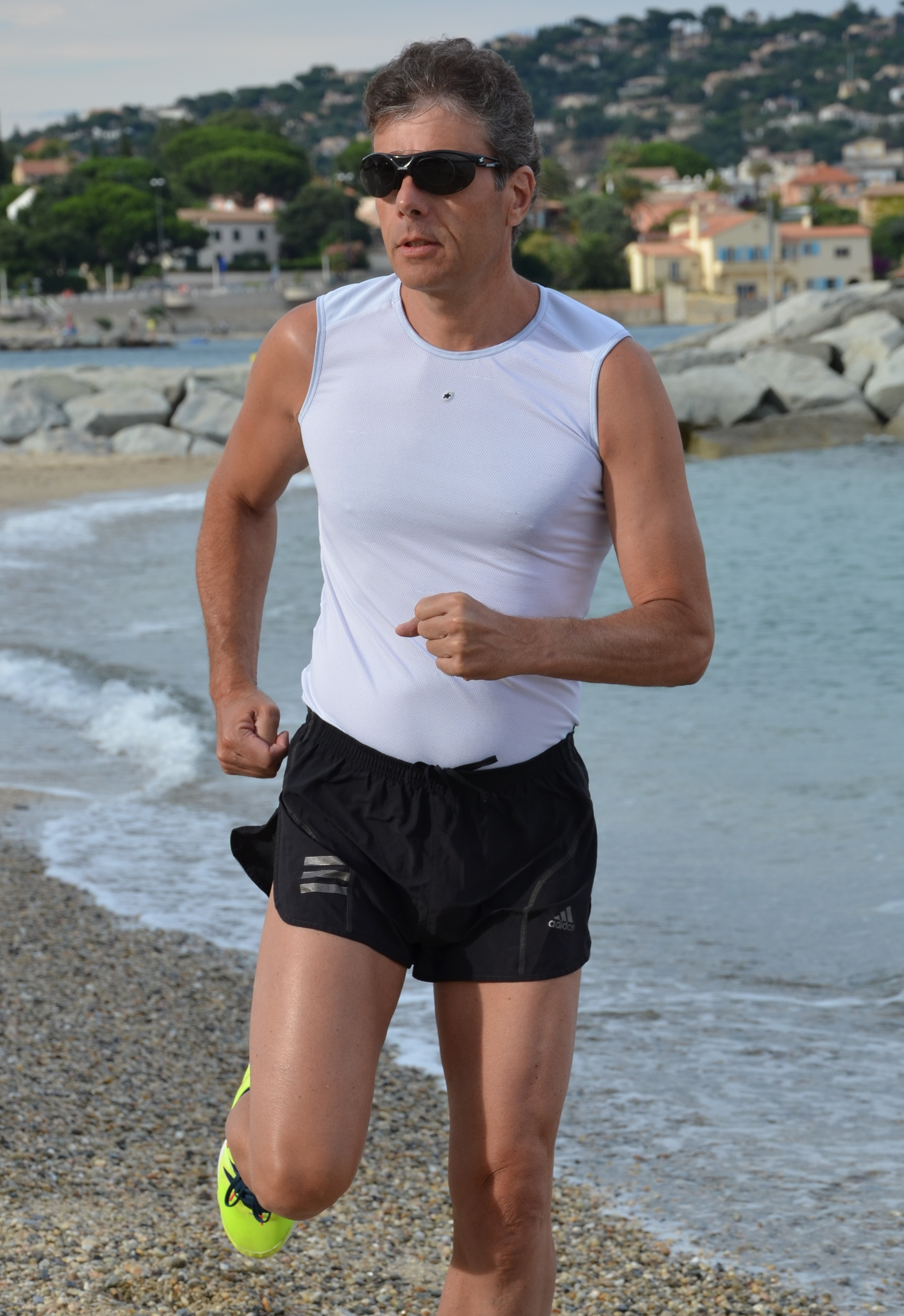 Nicola Pfund in A-Z fitness